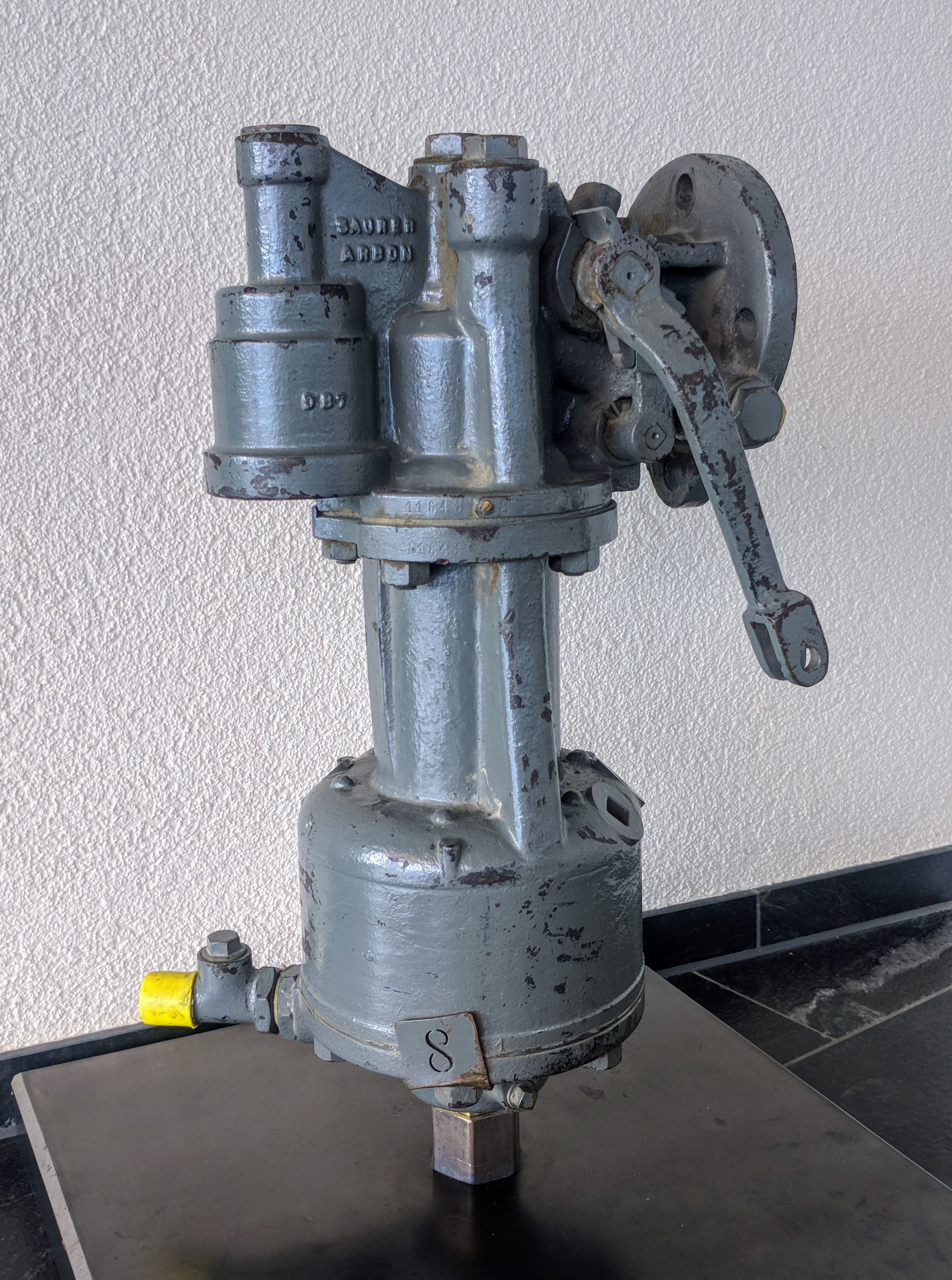 Ausgebautes Steuerventil der Drolshammer-Bremse